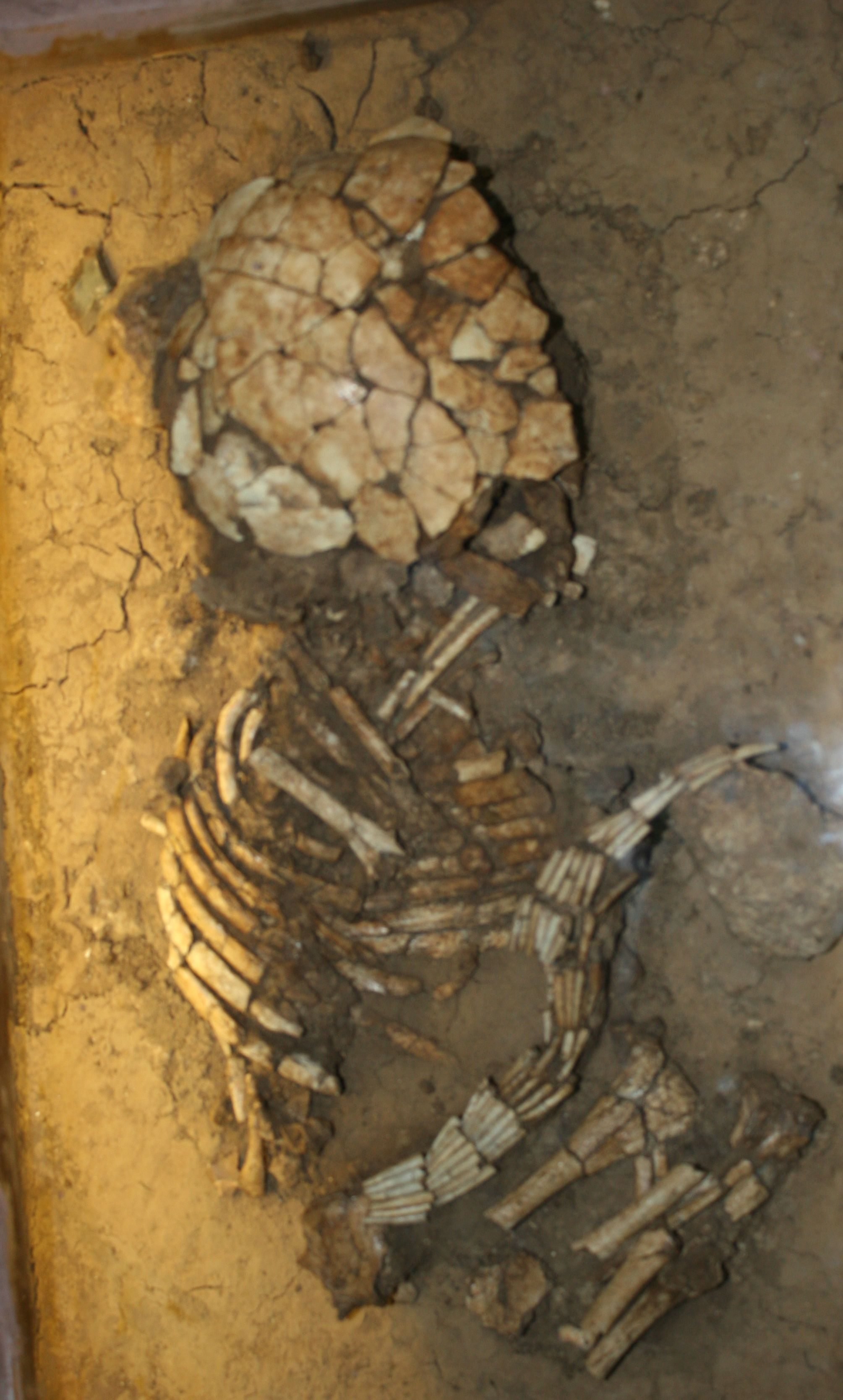 שלד של תינוק שנצמד אליו מחרוזות דנטליום -מוזיאון מעיין ברוך